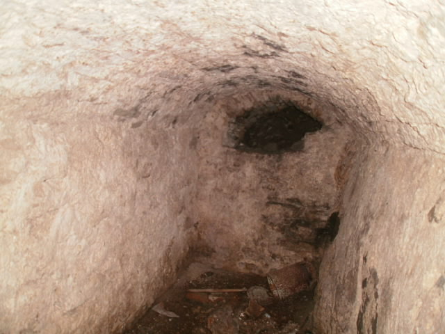 Tornialune kinnimüüritud käik.